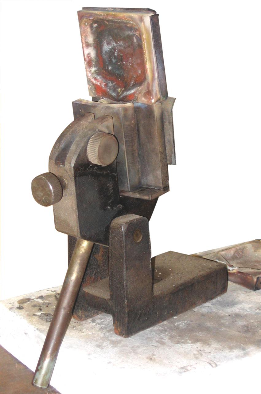 Lingotière à bascule en position verticale source : l'Or de Vaise photo Dominique grassigli